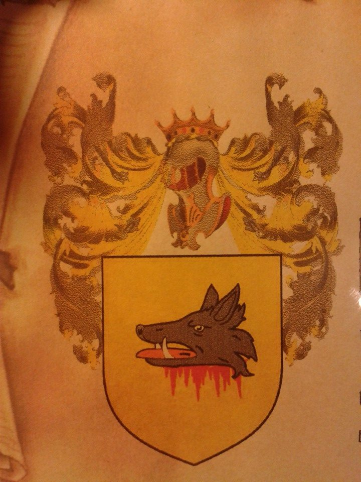 Escudo Valdueza 2 Siglo XI